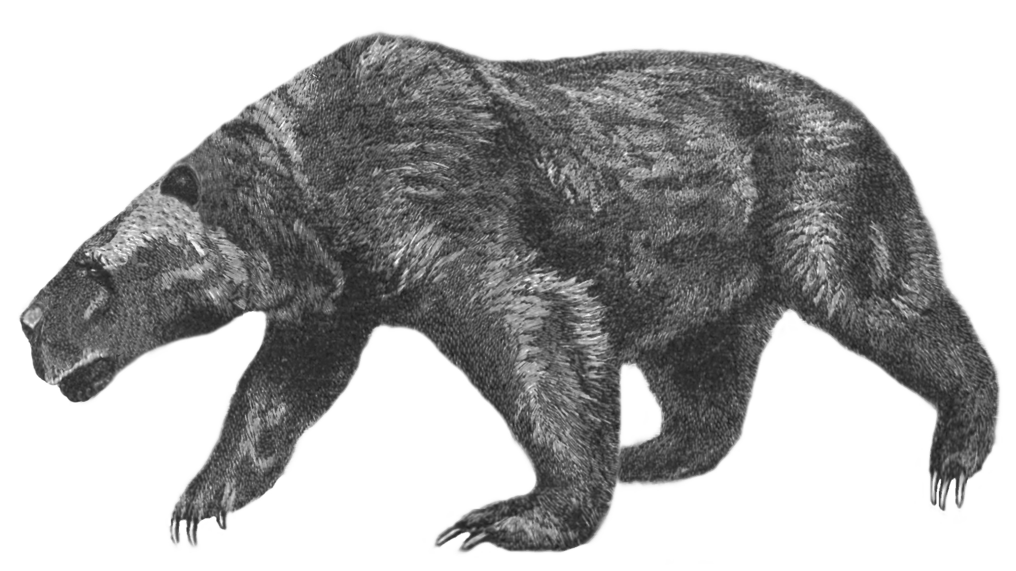 Kolponomos newportensis, реконструкция